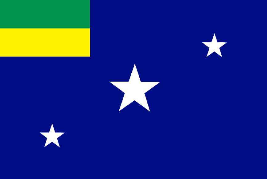 bandeira de lages